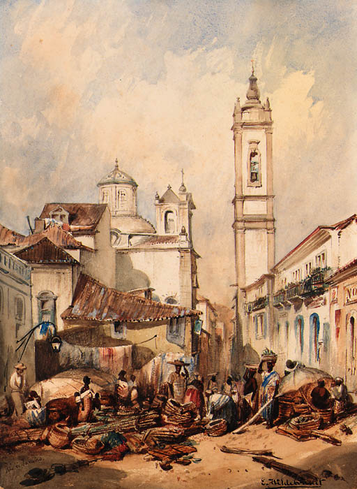 For another version of this subject by Hildebrandt, of similar size, see G. Ferrez, O Brasil de Eduard Hildebrandt, Rio de Janerio, [nd], p. 38, kat. 34 ('...um estupendo instantneo dos fundos do mercado da praa do Carmo (XV de Novembro), no incio da rua do Ouvidor, em bela manh ensolorada, vendo-se a cpula e lanterna da igreja dos Mercadores da Lapa e torre da igreja da Cruz dos Militares).